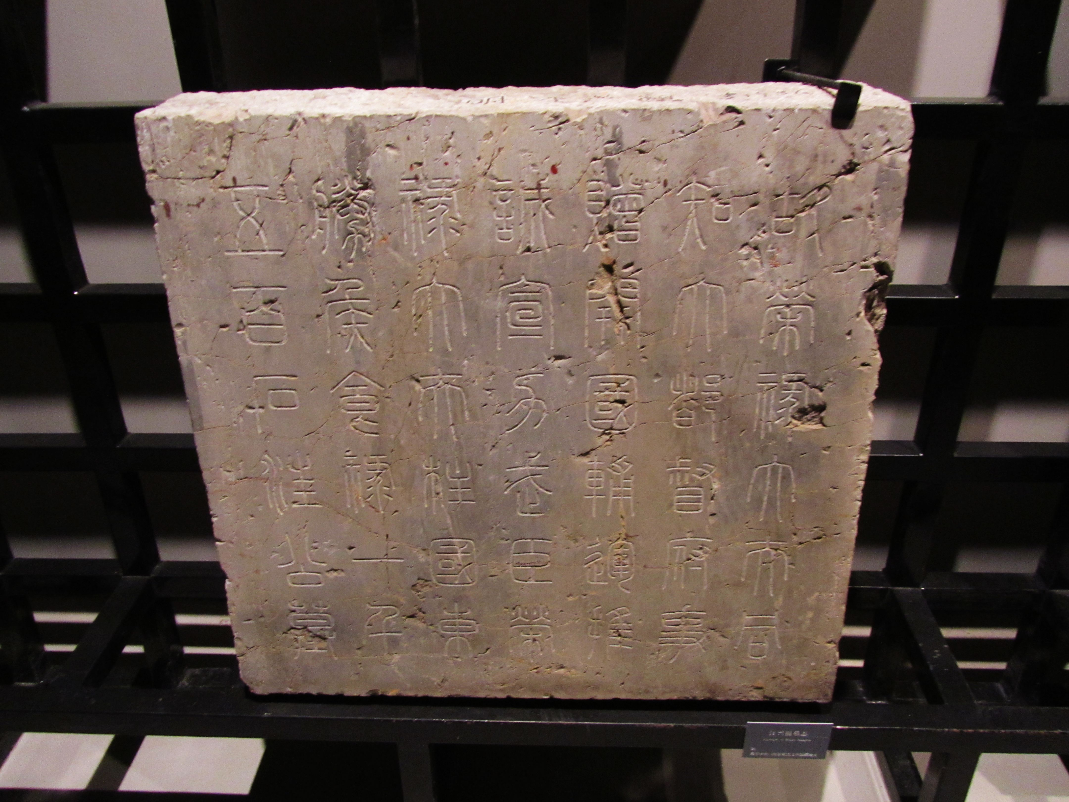 明代汪兴祖墓志志盖，藏于南京市博物馆（朝天宫）。